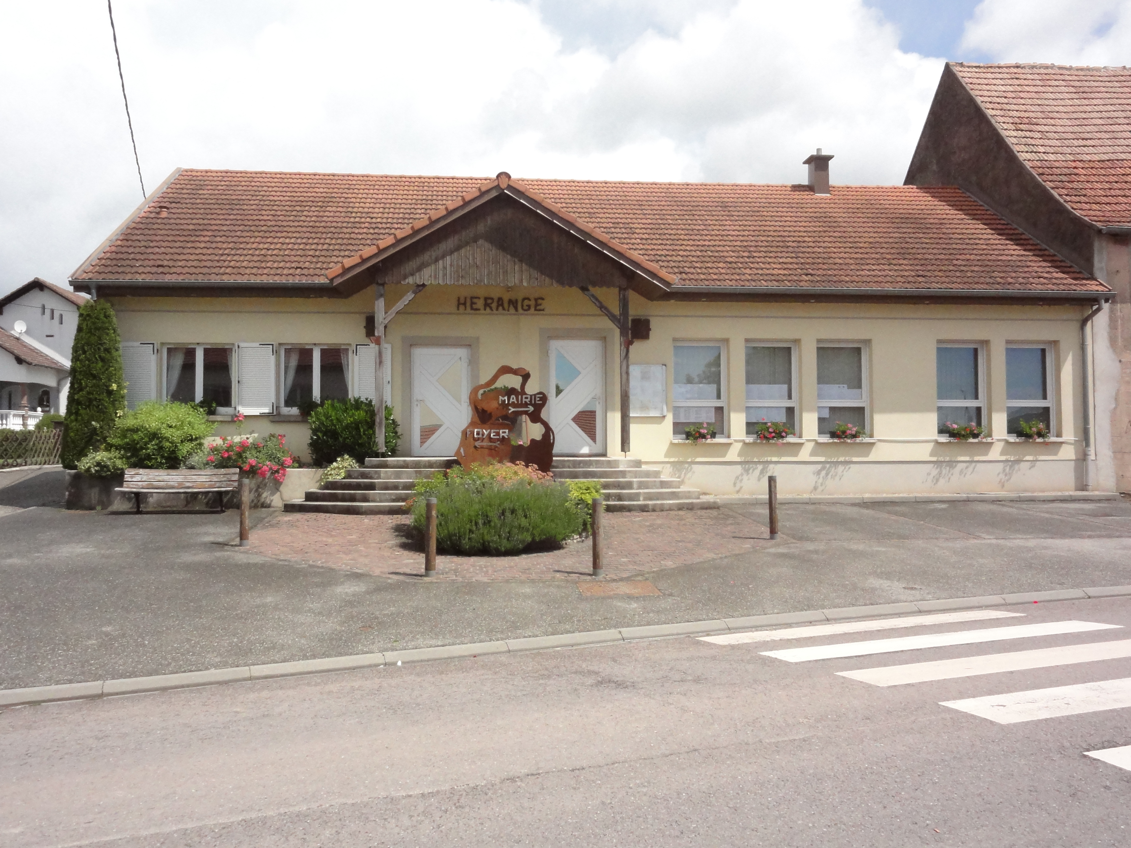 Hérange (Moselle) mairie - foyer rural